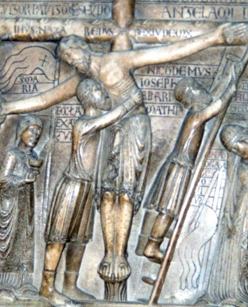 Deposition by Benedetto Antelami, 1178